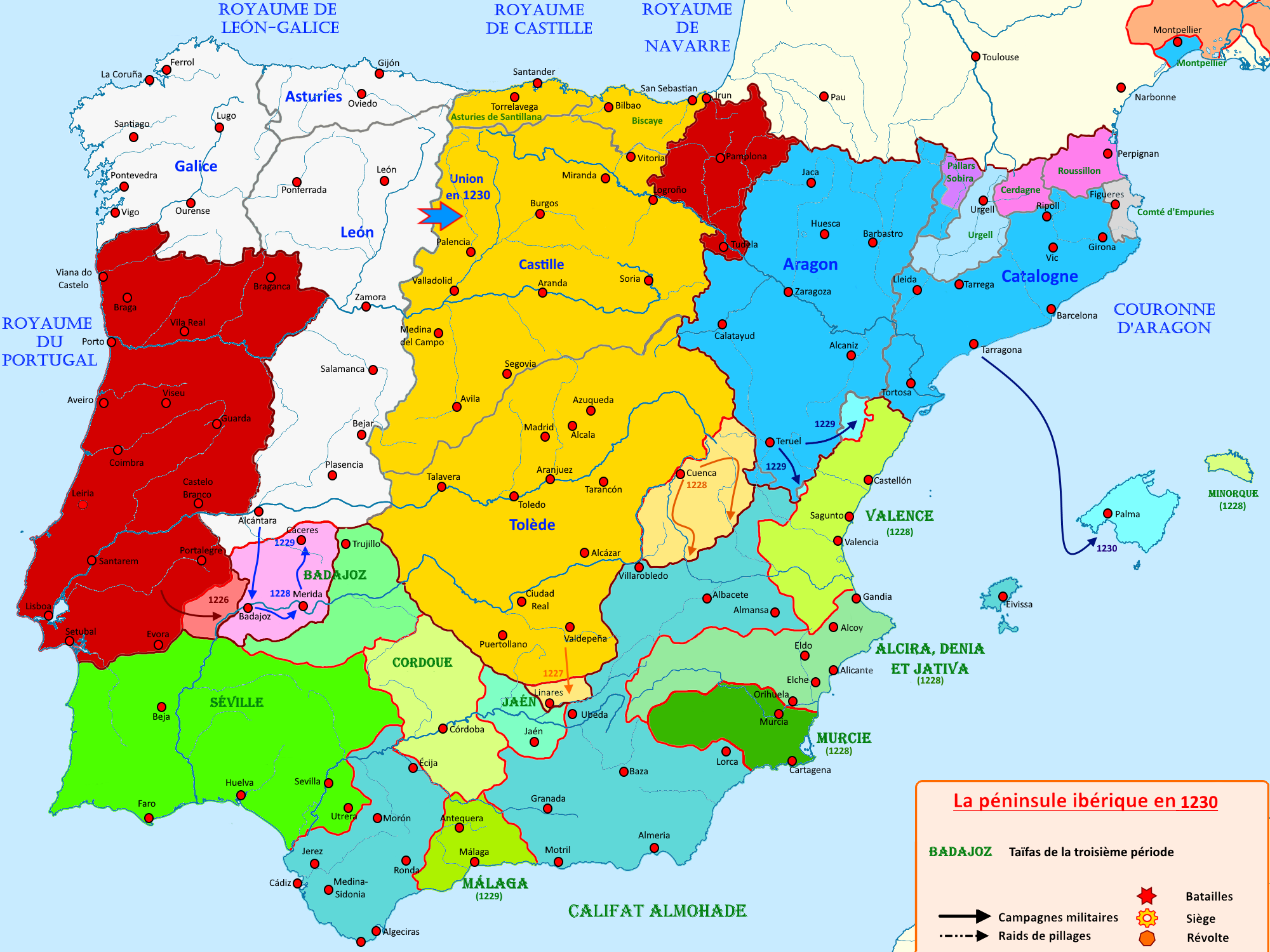 Carte de la péninsule ibérique en 1230 illustrant les principaux évènements de la période